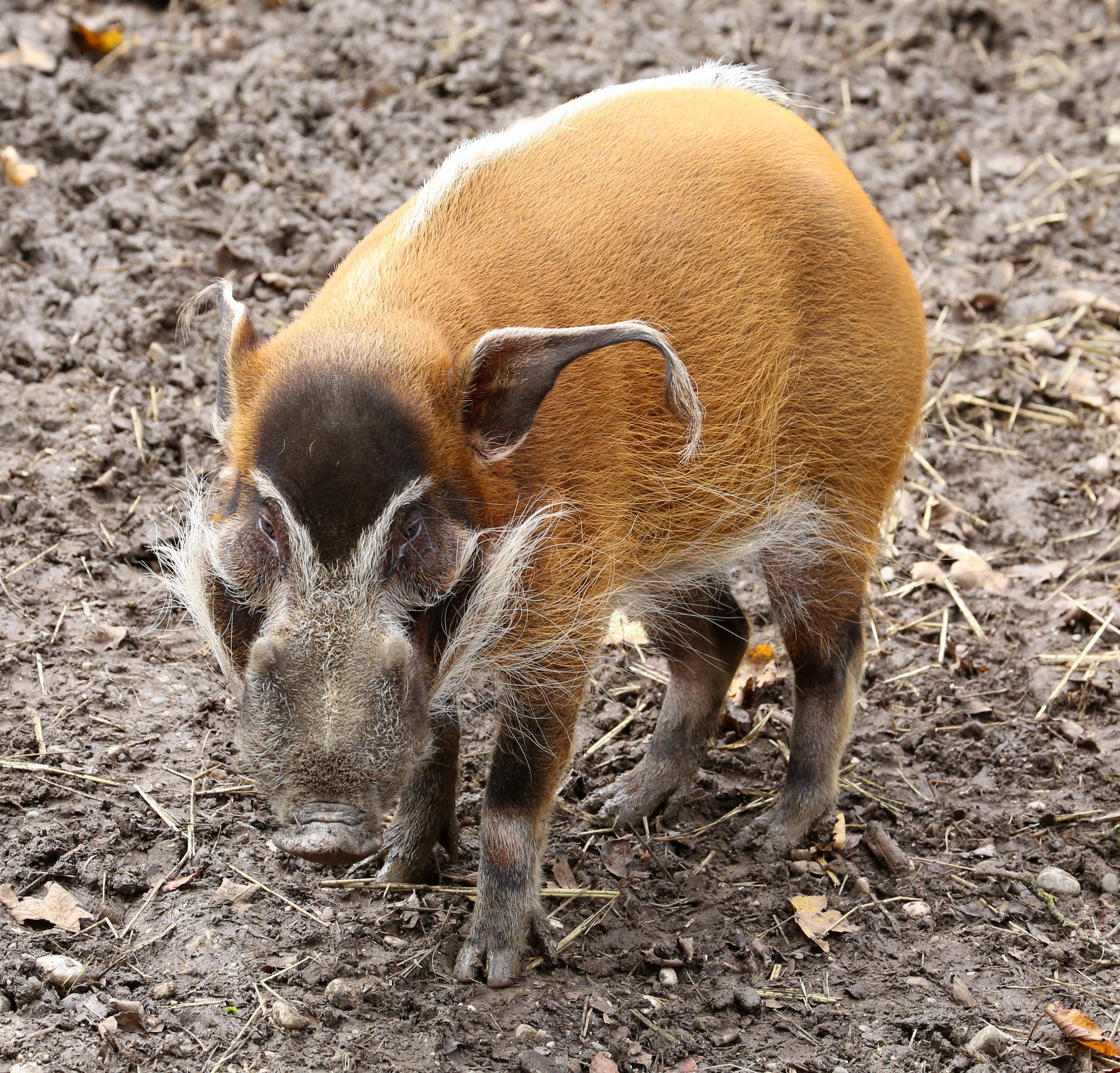 Pinselohrschwein (Potamochoerus porcus), Tierpark Hellabrunn, München